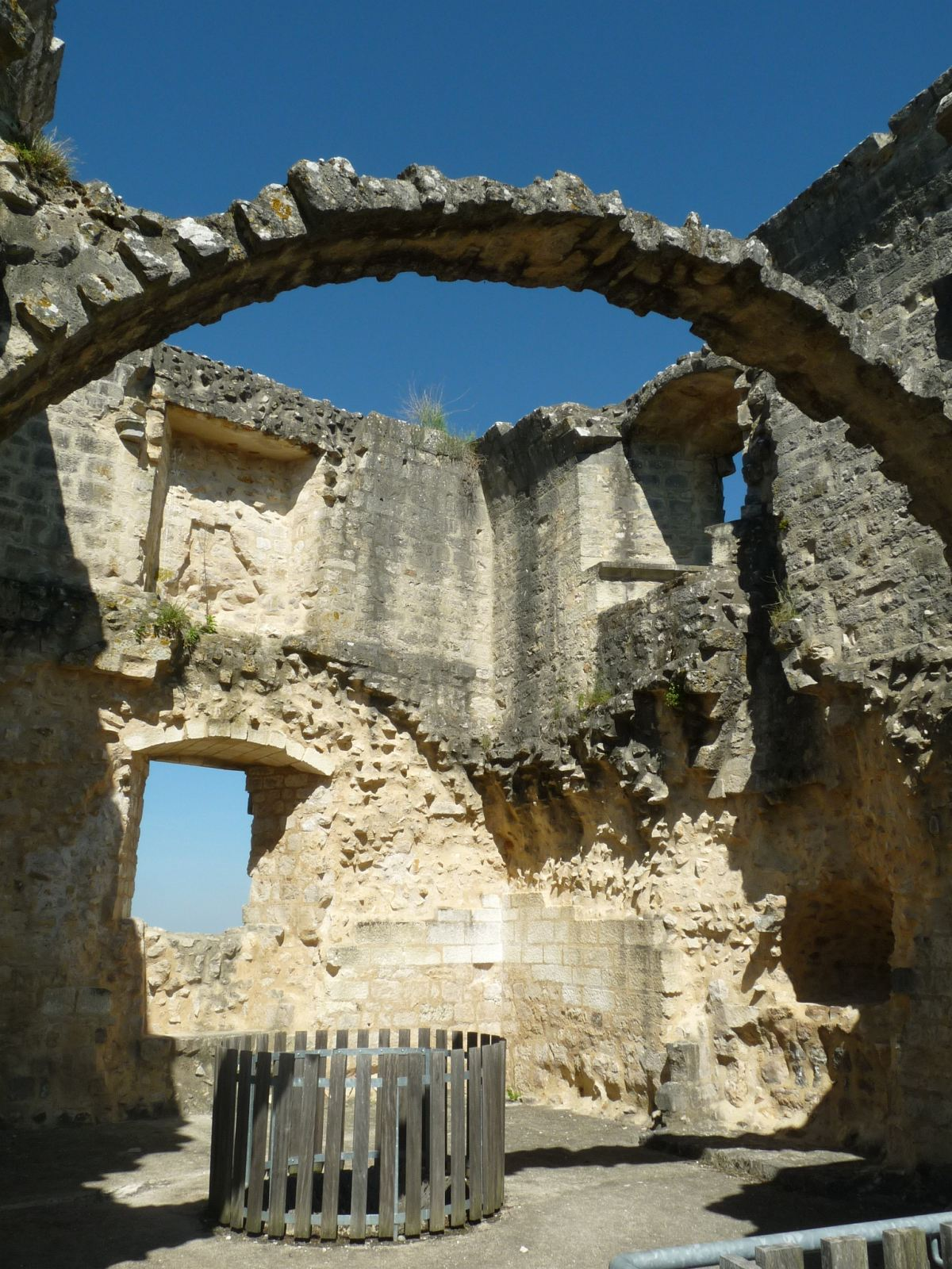 Donjon de Marthon, Charente, France